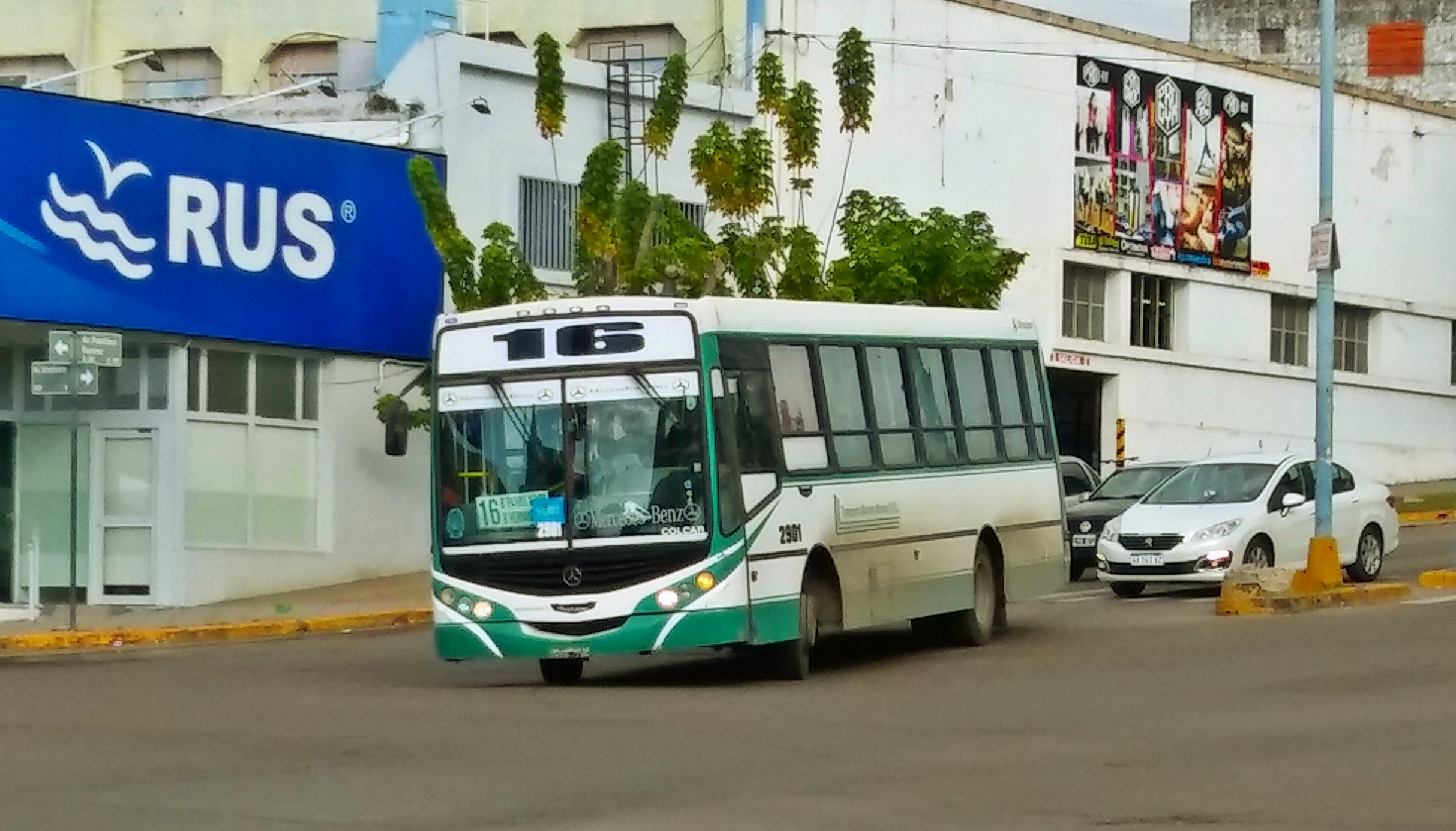 Transporte Mariano Moreno S.R.L. del Grupo ERSA Línea 16 - Interno 2901 Metalpar Tronador II Mercedes-Benz OF1418 5 Esquinas - Paraná, Entre Ríos